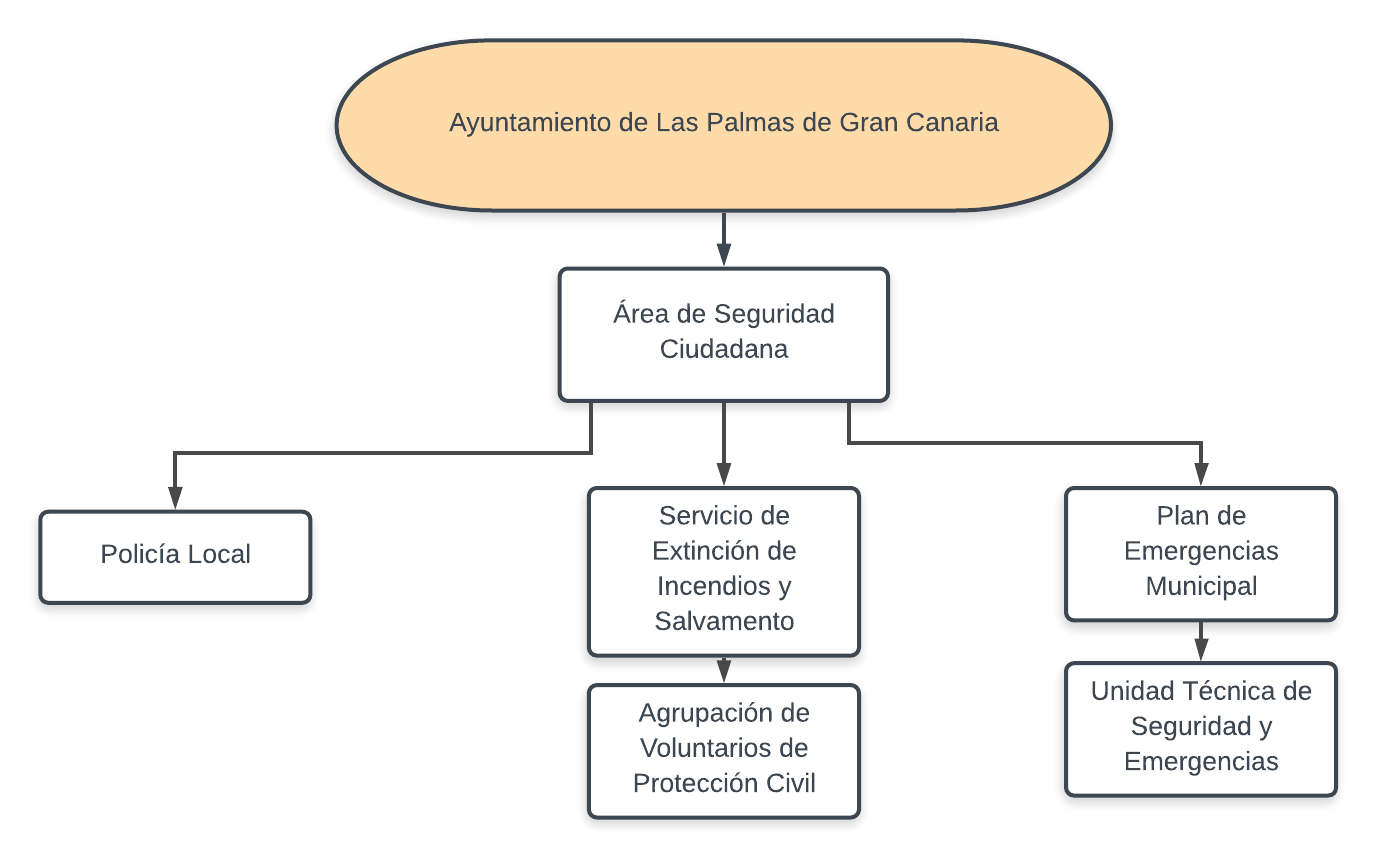 Organización Seguridad y Emergencias hasta 2019